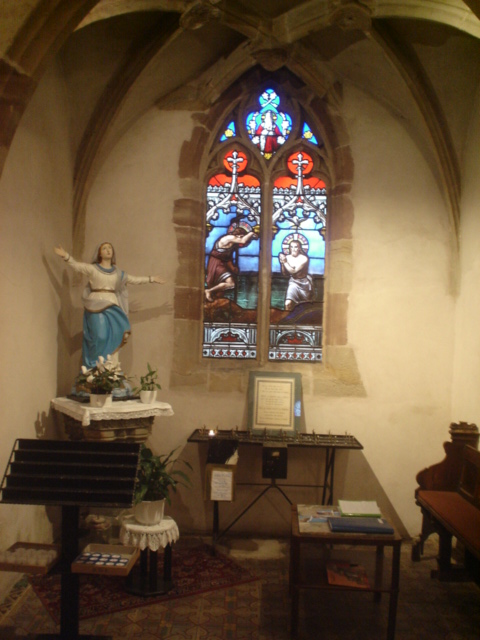 Collégiale St-Étienne de Hombourg-Haut : la chapelle des Bayer